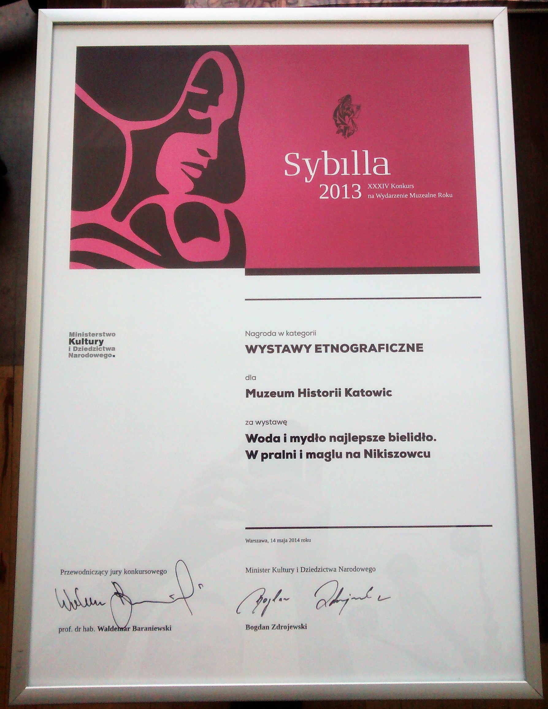 Muzeum Historii Katowic w 2014 otrzymało „Sybilla 2013” za wystawę stałą „Woda i mydło najlepsze bielidło. W pralni i maglu na Nikiszowcu”, którą można zobaczyć w Dziale Etnologii Miasta MHK na Nikiszowcu